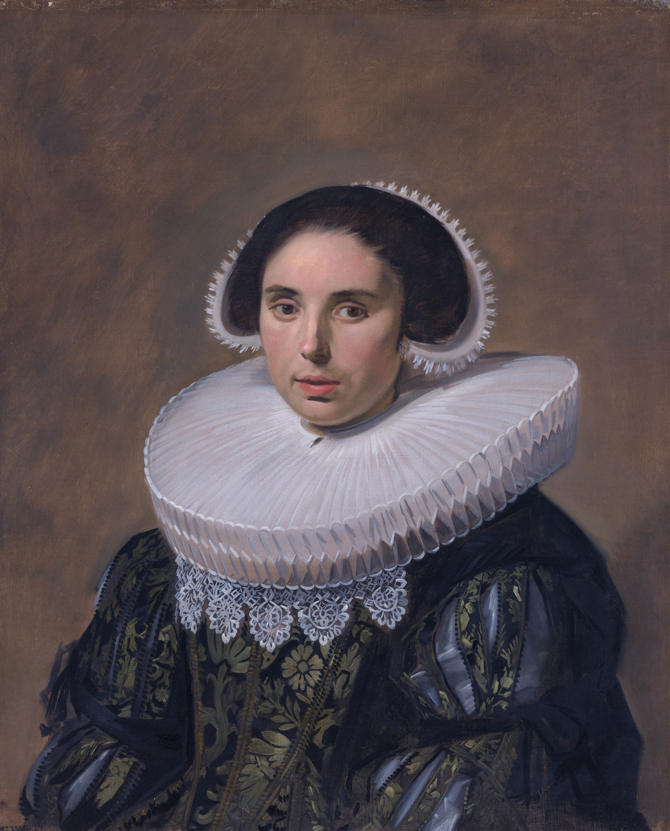 Pendant of File:Frans Hals 035.jpg